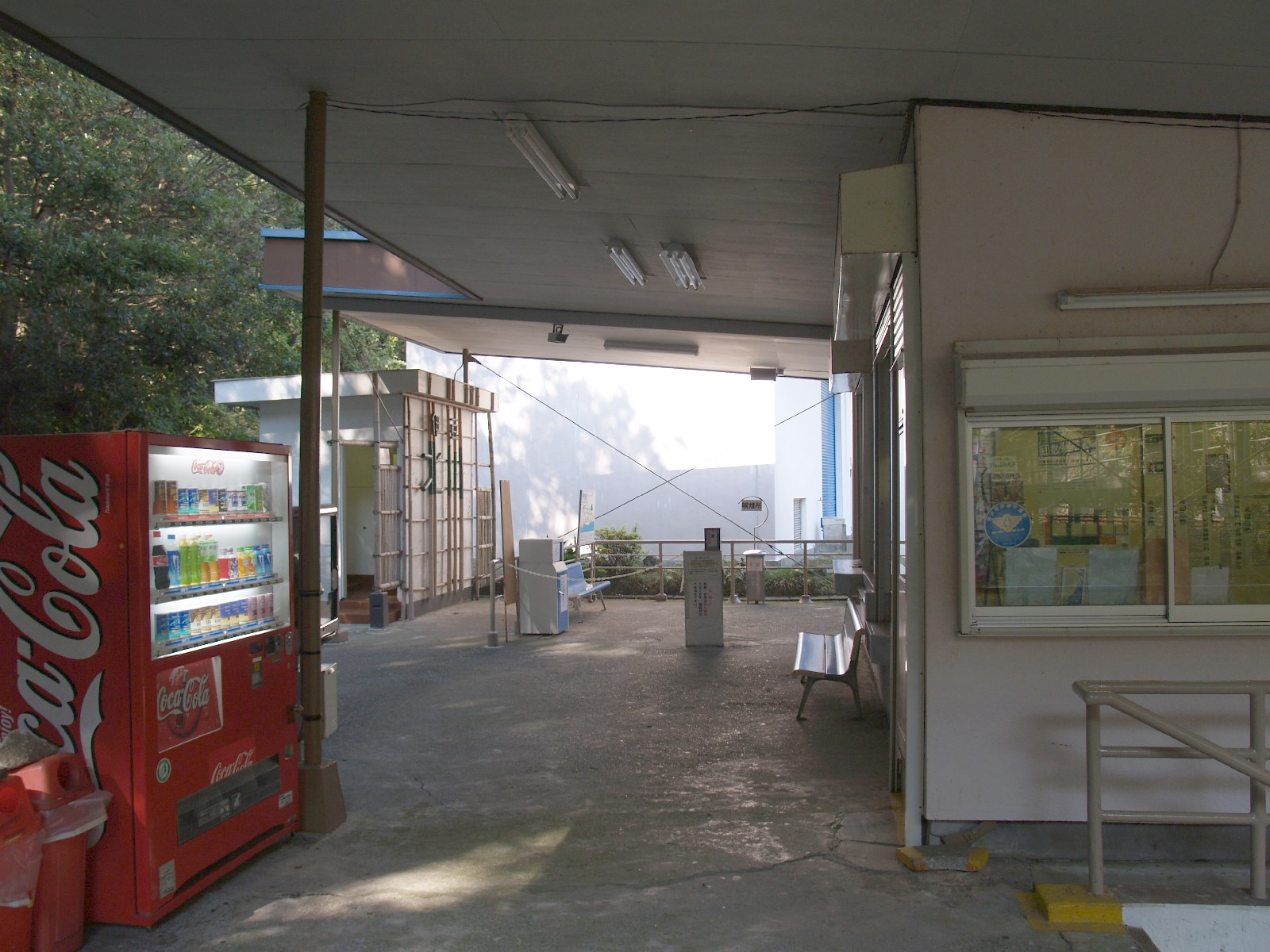 伊豆北川駅改札口